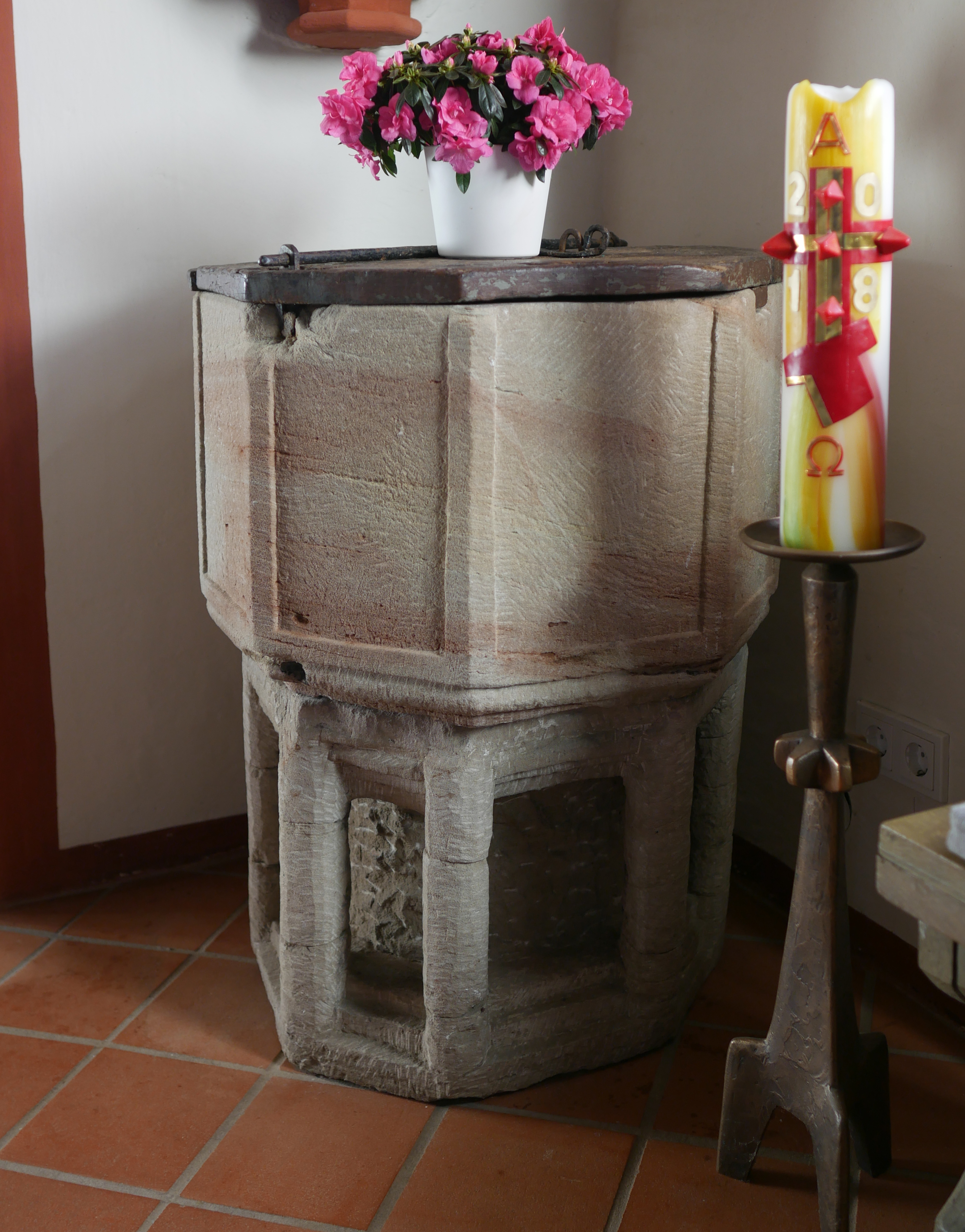 Romanischer Taufstein: Kirche St. Abriuculus in Besslich (Rheinland-Pfalz, Kreis Trier-Saarburg)